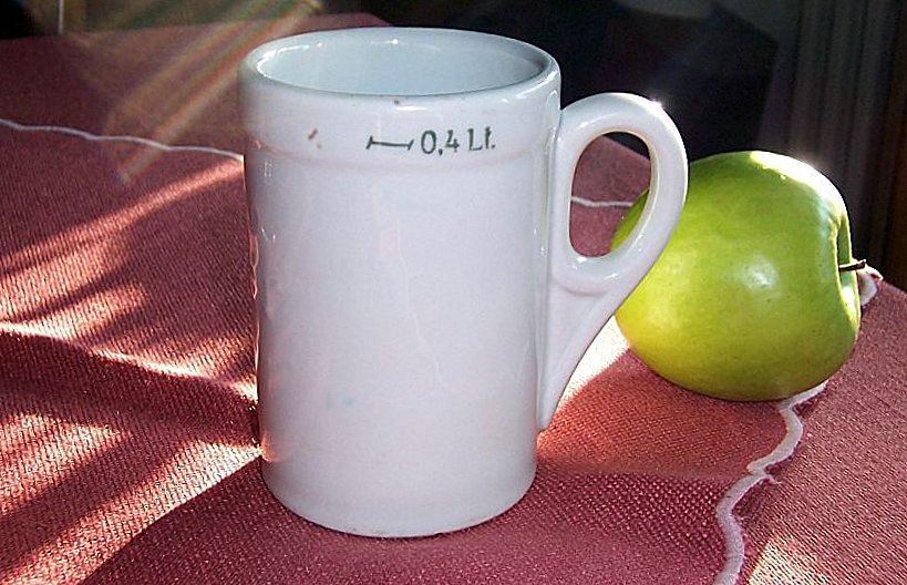 Darstellung Viezporz